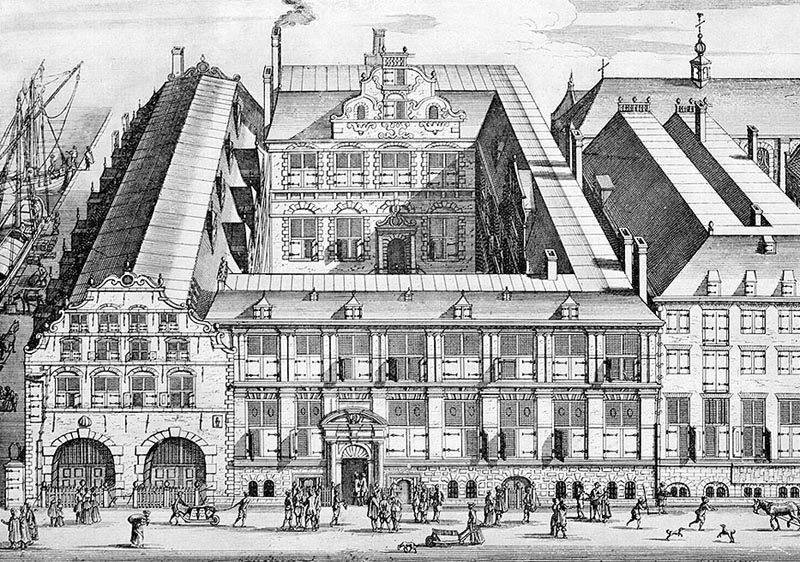 Gravure van het Oost Indisch Huis. Gebouwd in 1606. Afgebroken in 1891. Nu de locatie van het Bushuis